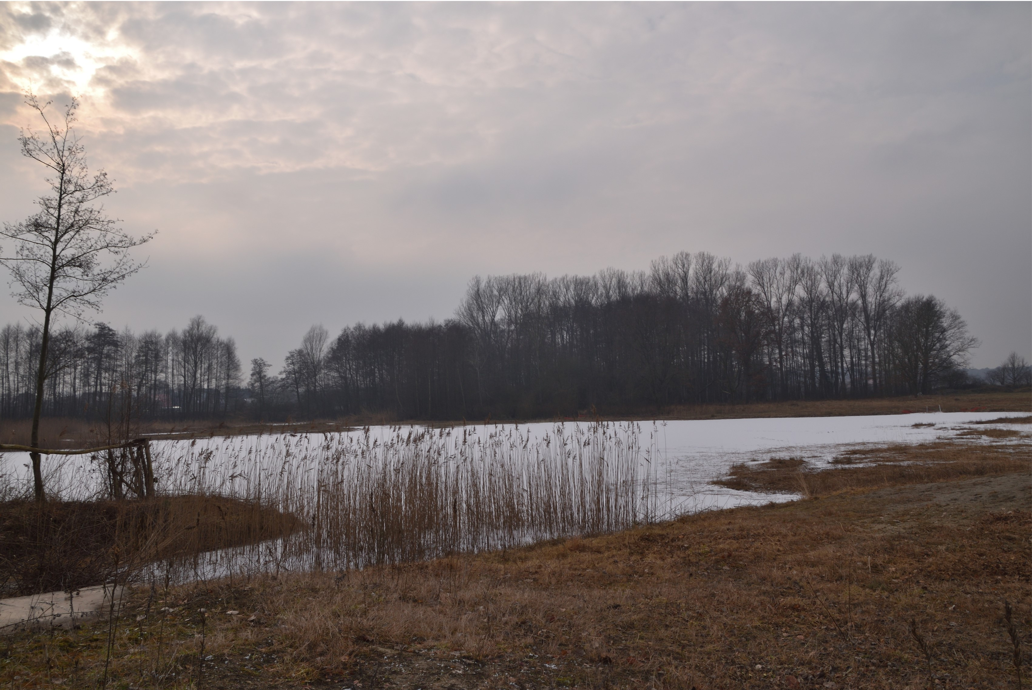 Okeler Sandgrube